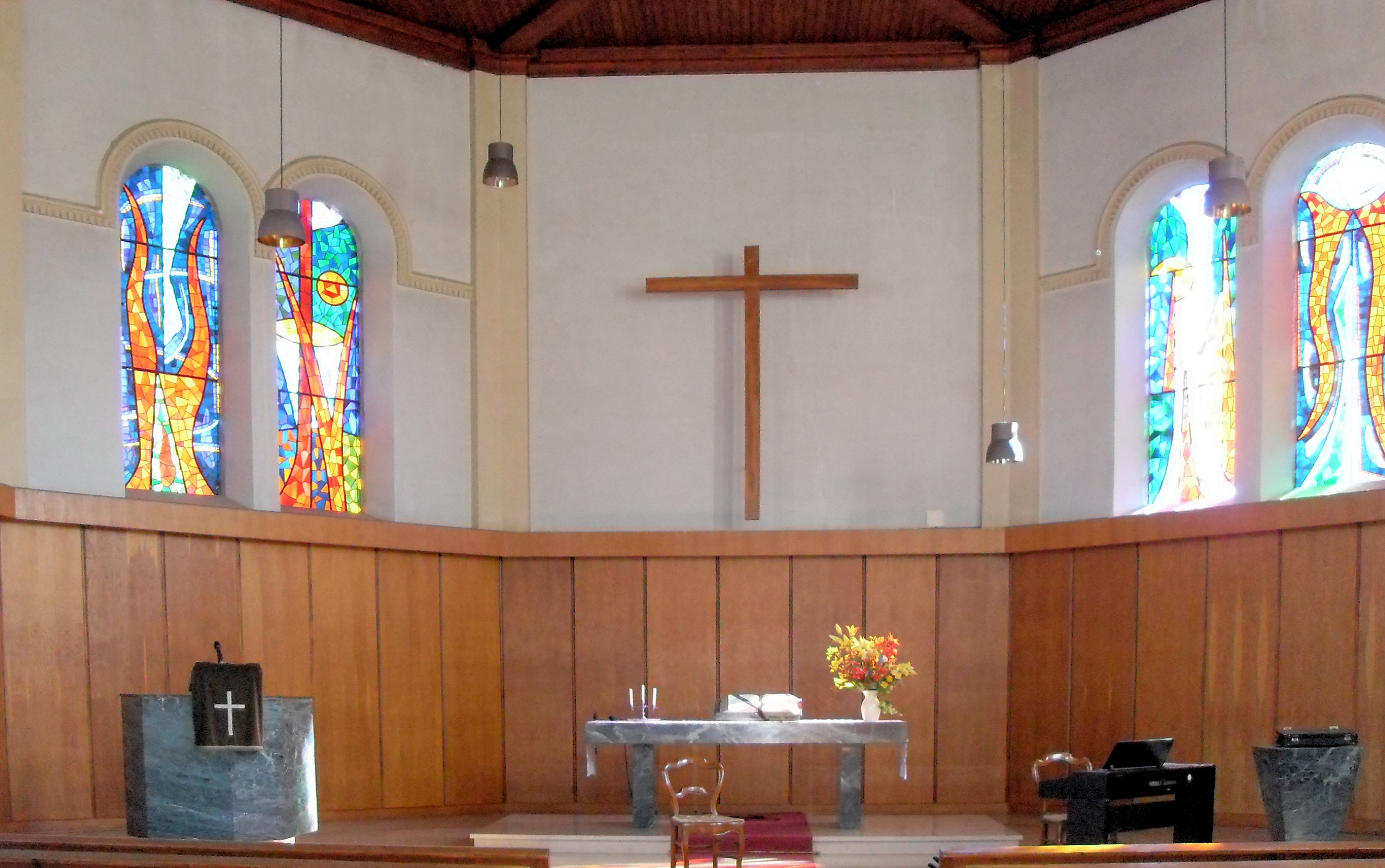 L'intérieur de temple protestant à Dasle